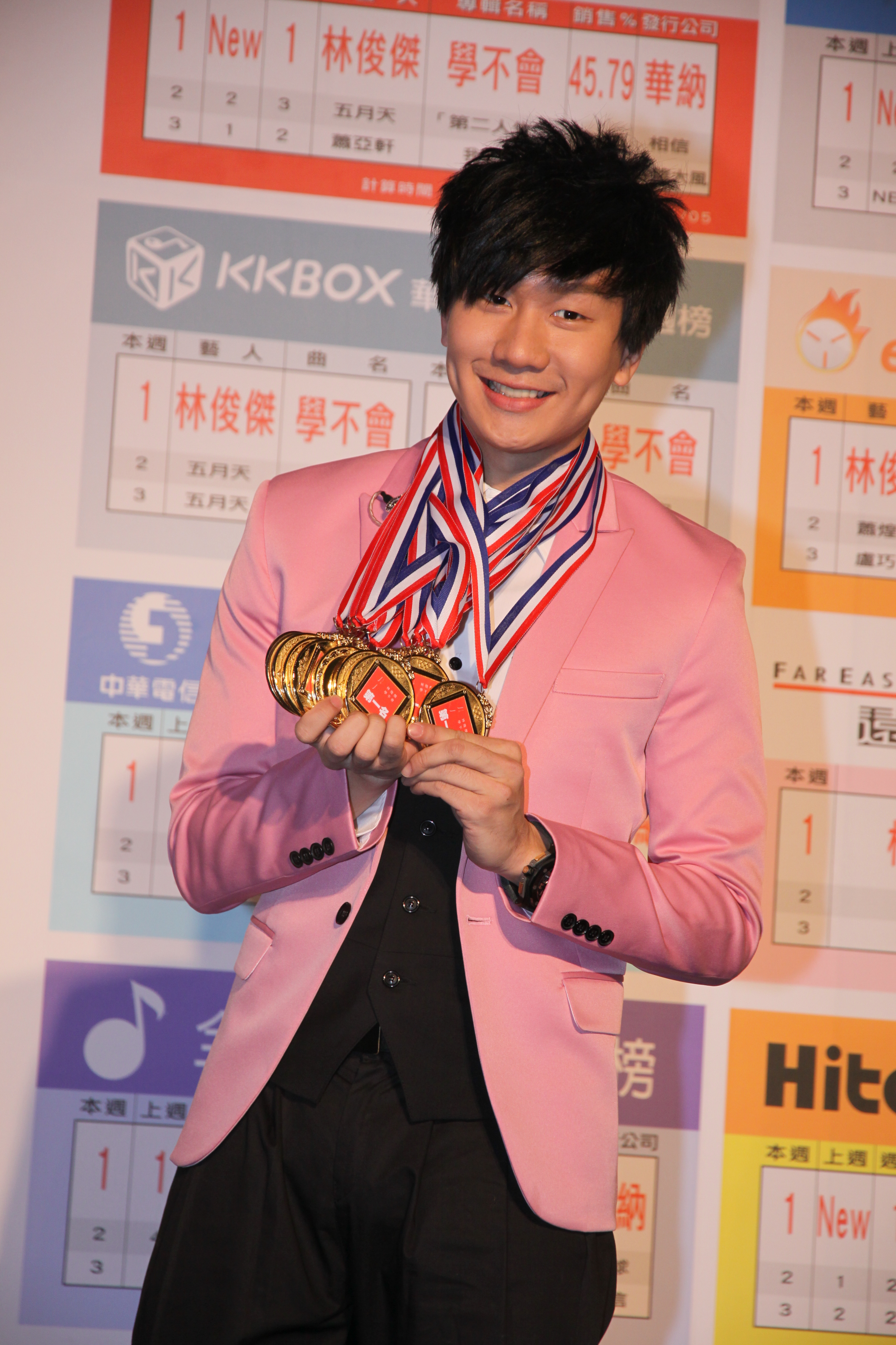 中文（台灣）: @ 學不會慶功記者會